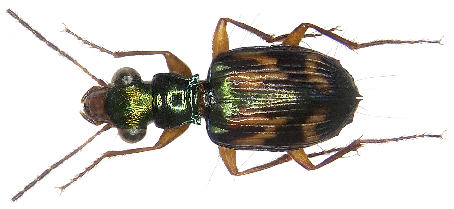 Familie: Carabidae Grösse: 7,5 mm Fundort: Indonesien, Irian, Jaya, Manokwari leg. A.Skale, 2007; det. M.Baehr Foto: U.Schmidt, 2007